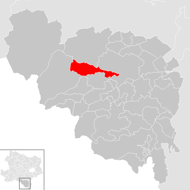 Bezirk Neunkirchen